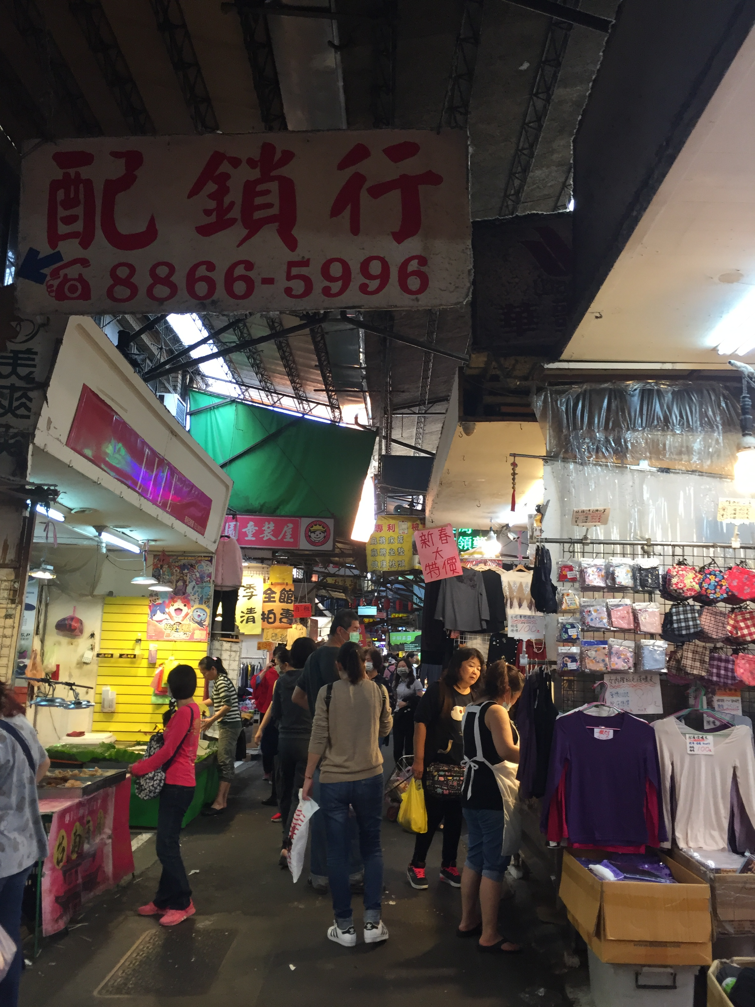 台灣台北市士林區華榮街華榮市場街景